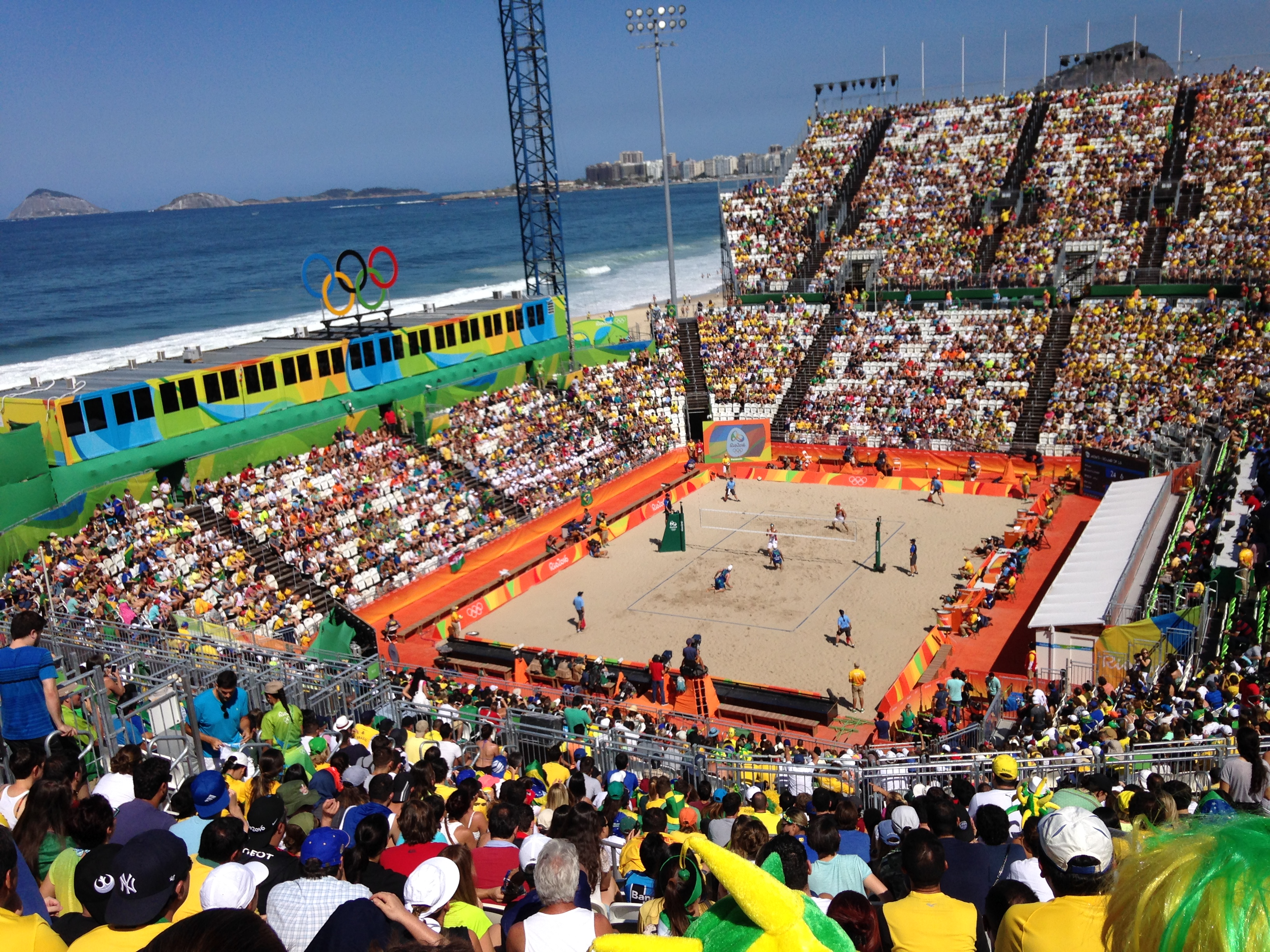 Arena montada na praia de Copacabana exclusivamente para a competição de vôlei de praia nas Olimpíadas Rio 2016. Cenário perfeito.